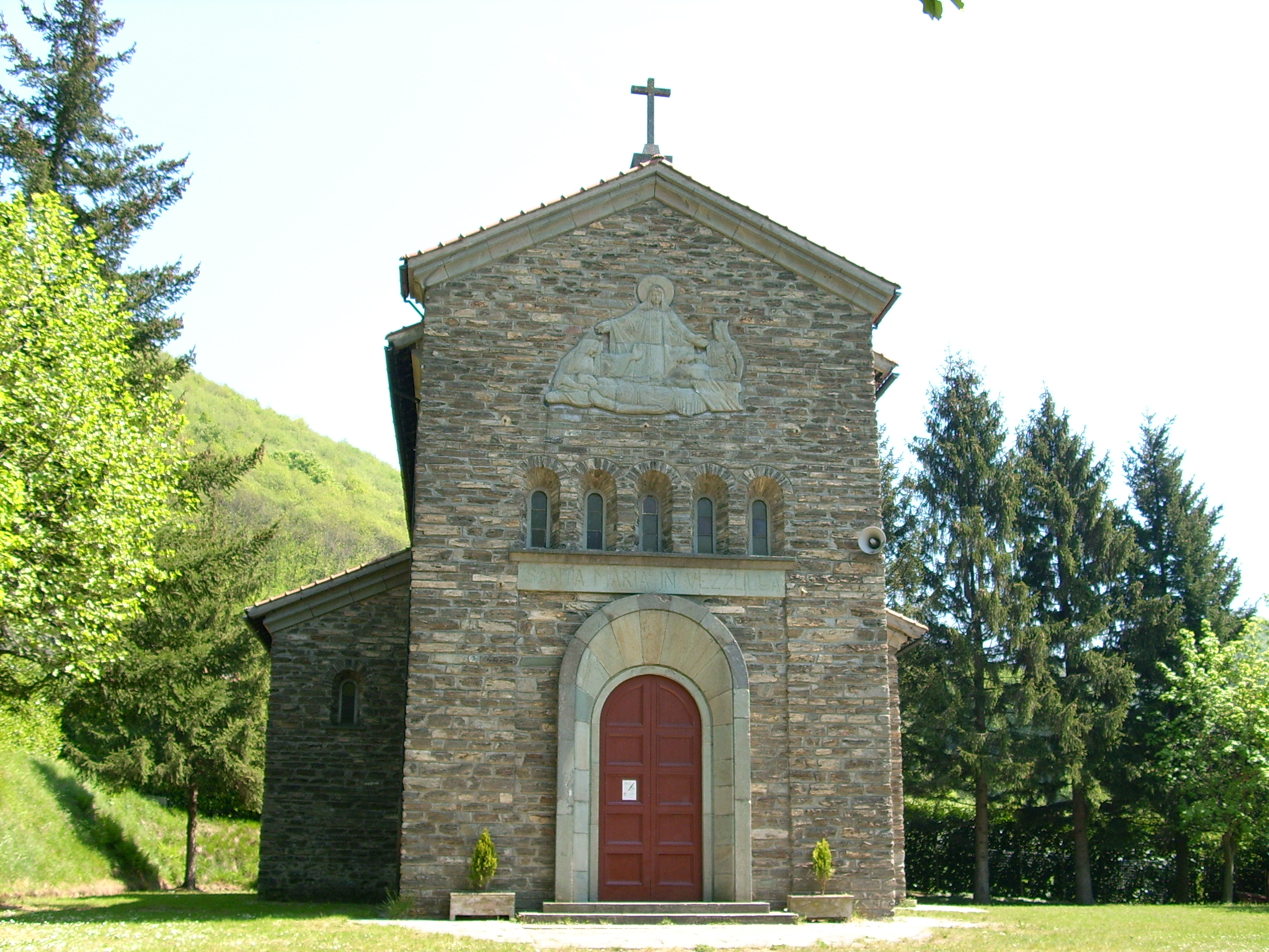 Chiesa di Santa Maria in Vezzulla di Masone, Liguria, Italia